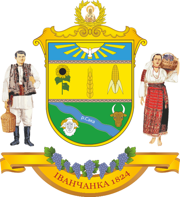 Герб села Іванчанка